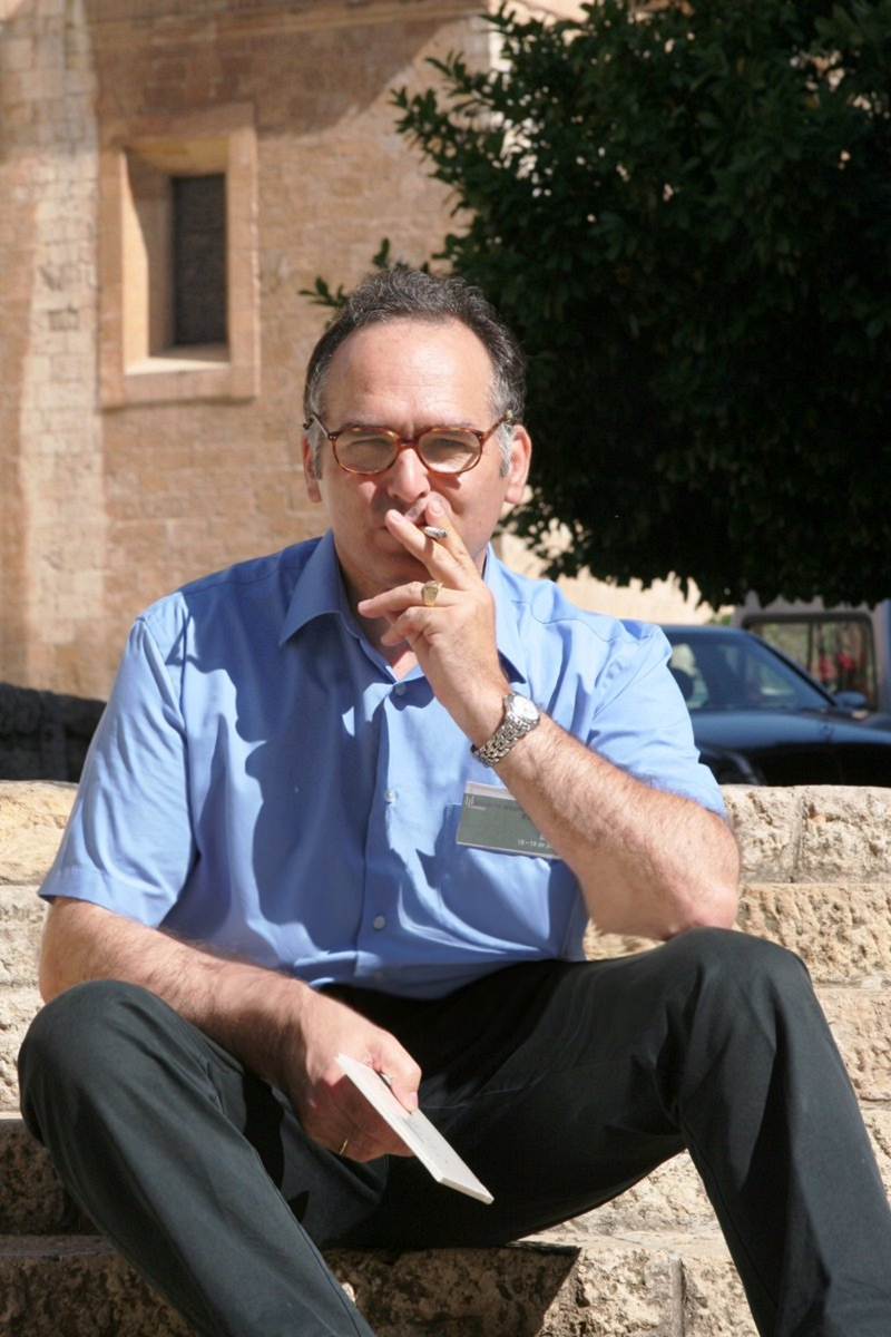 Escritor y crítico literario.